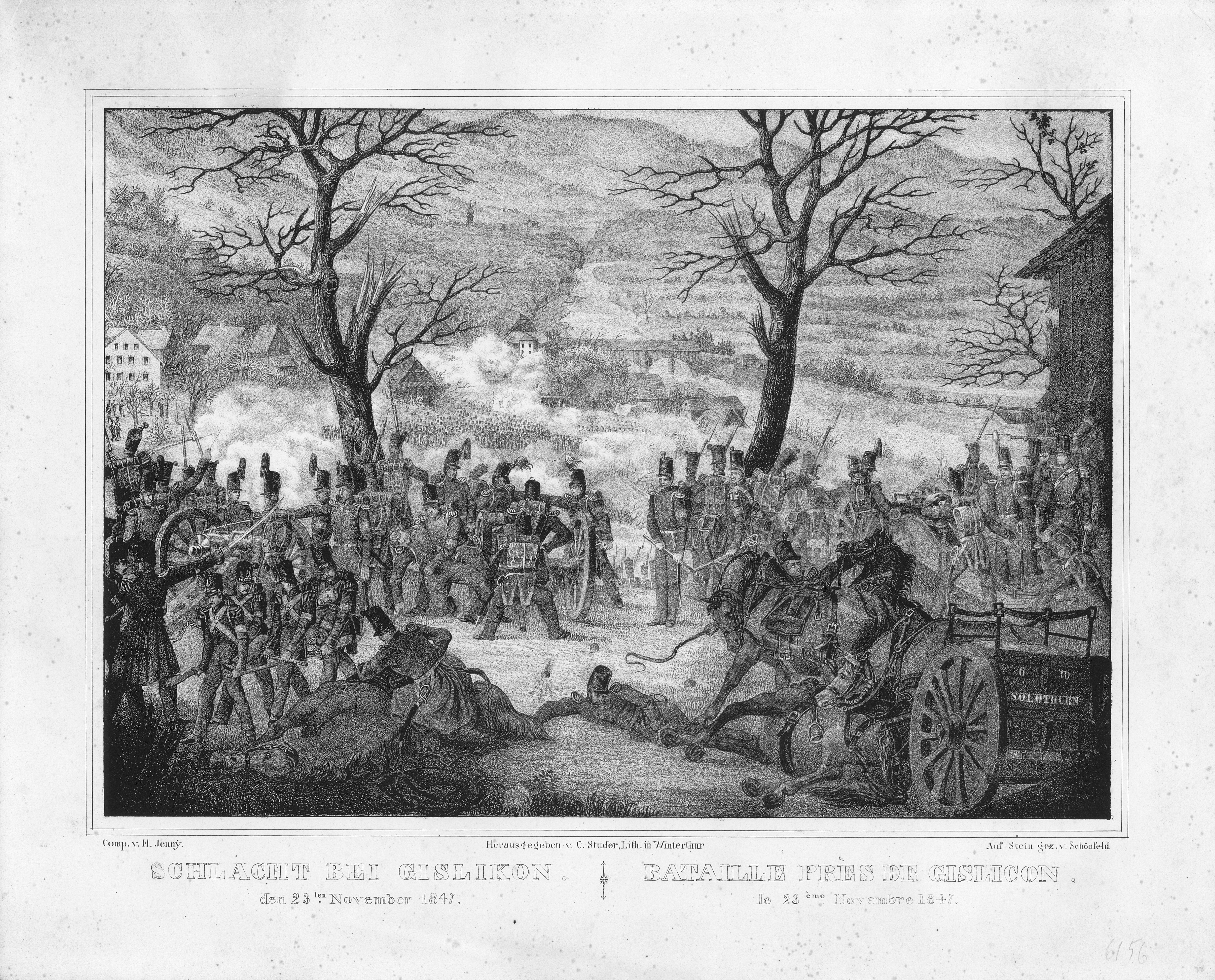 Zeitgenössische Druckgraphik über das Gefecht bei Gisikon während des Sonderbundskrieges in der Schweiz, 23. November 1847